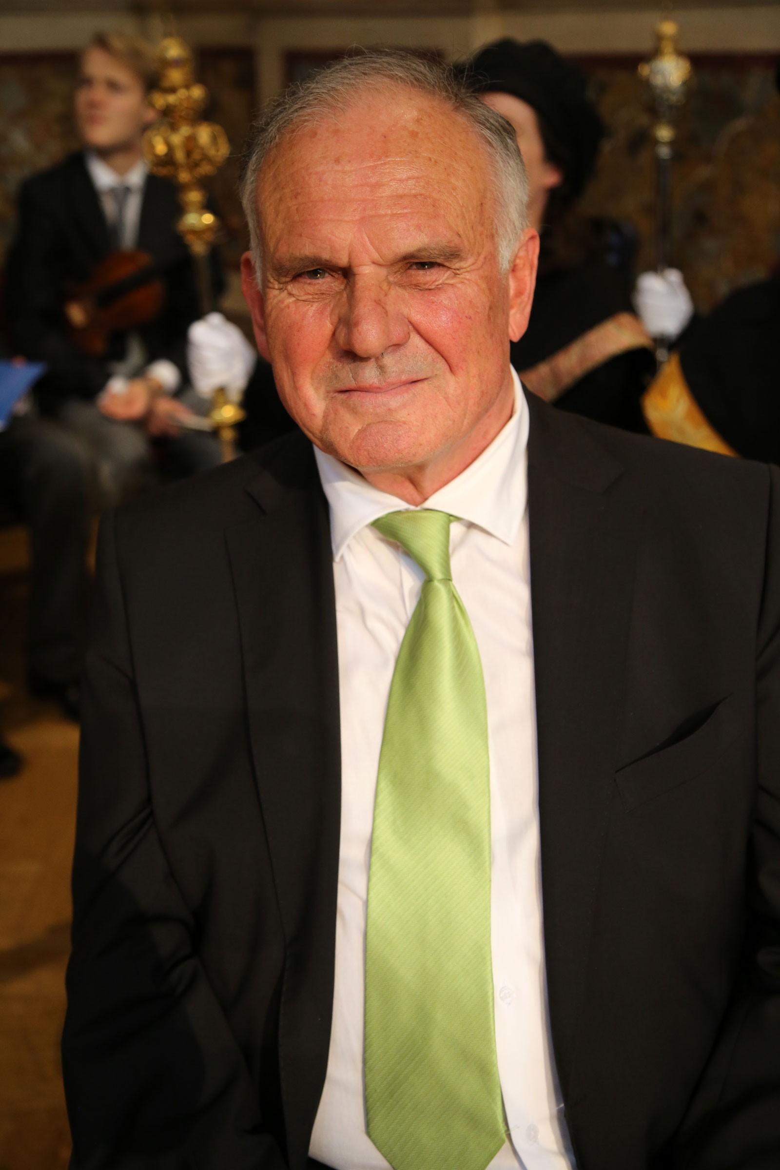 Honsell_Heinrich-1274